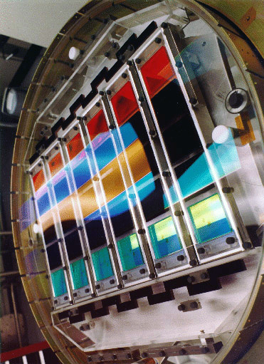 SDSS Telescope Camera